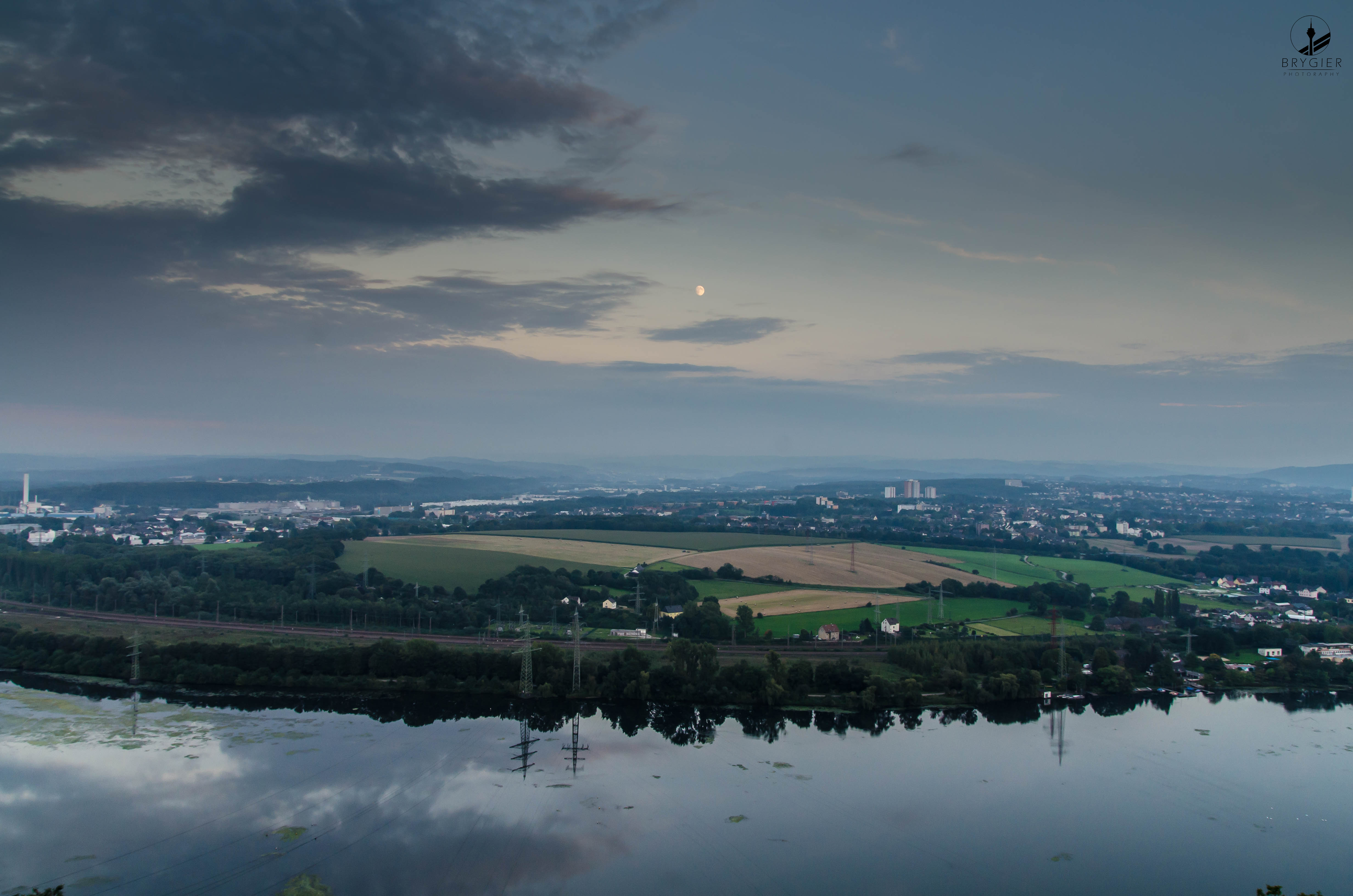 Blick vom Oberbecken des Koepchenwerks in Herdecke über den Hengsteysee nach Hagen (Stadtbezirk Hagen-Nord): links Hagen-Bathey (Schornstein des Heizkraftwerks Hagen-Kabel am Bildrand), rechts Hagen-Hengstey, im Hintergrund u.a. Hagen-Boele und Hagen-Helfe, in der Mitte Ackerflächen rund ums Böhfeld (Landschaftsschutzgebiet „Auf dem Boehfelde“), vorne links Naturschutzgebiet „Uhlenbruch“ (Waldbereich)